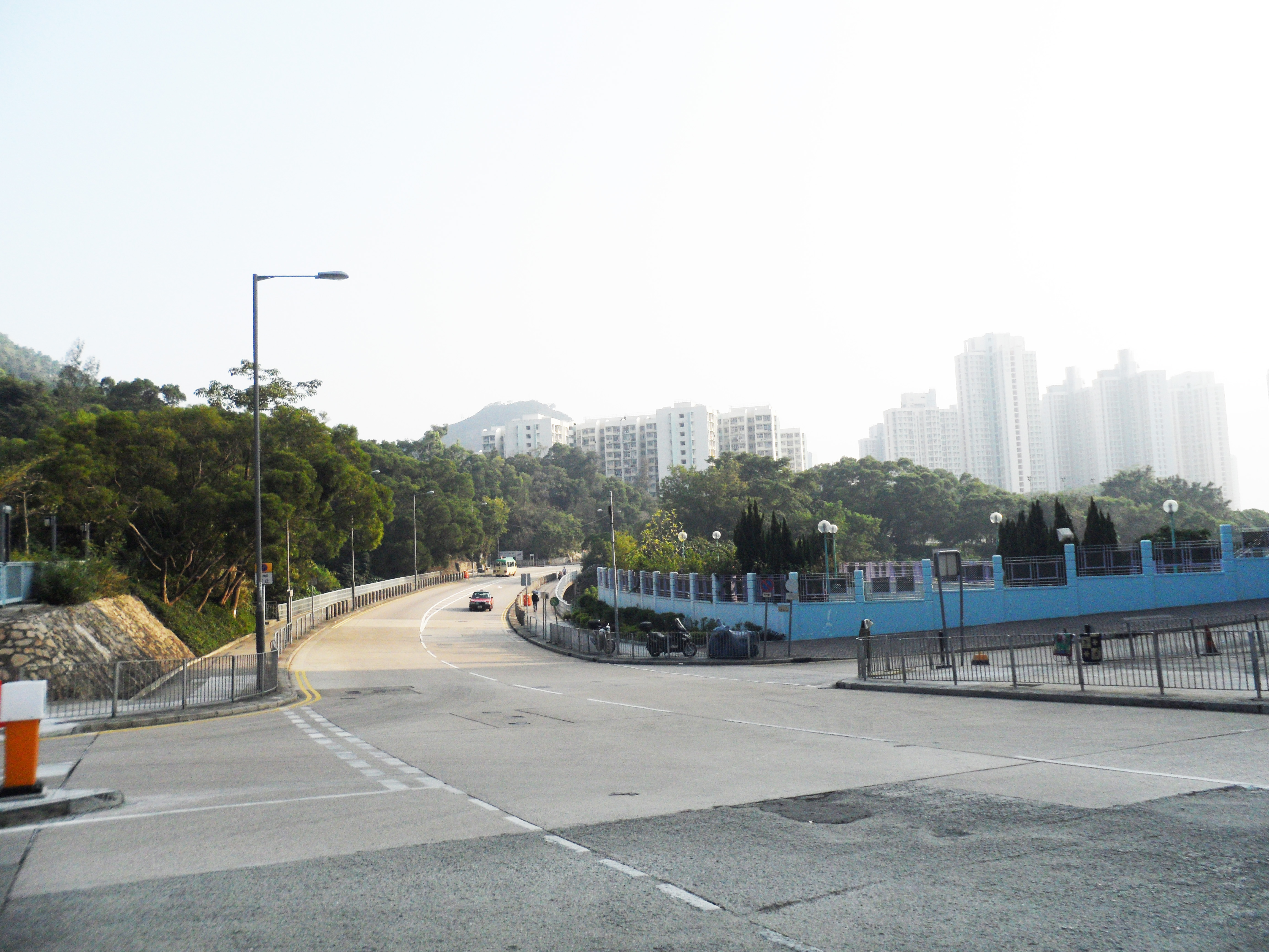 碧雲道鄰近廣田邨與康栢苑路段